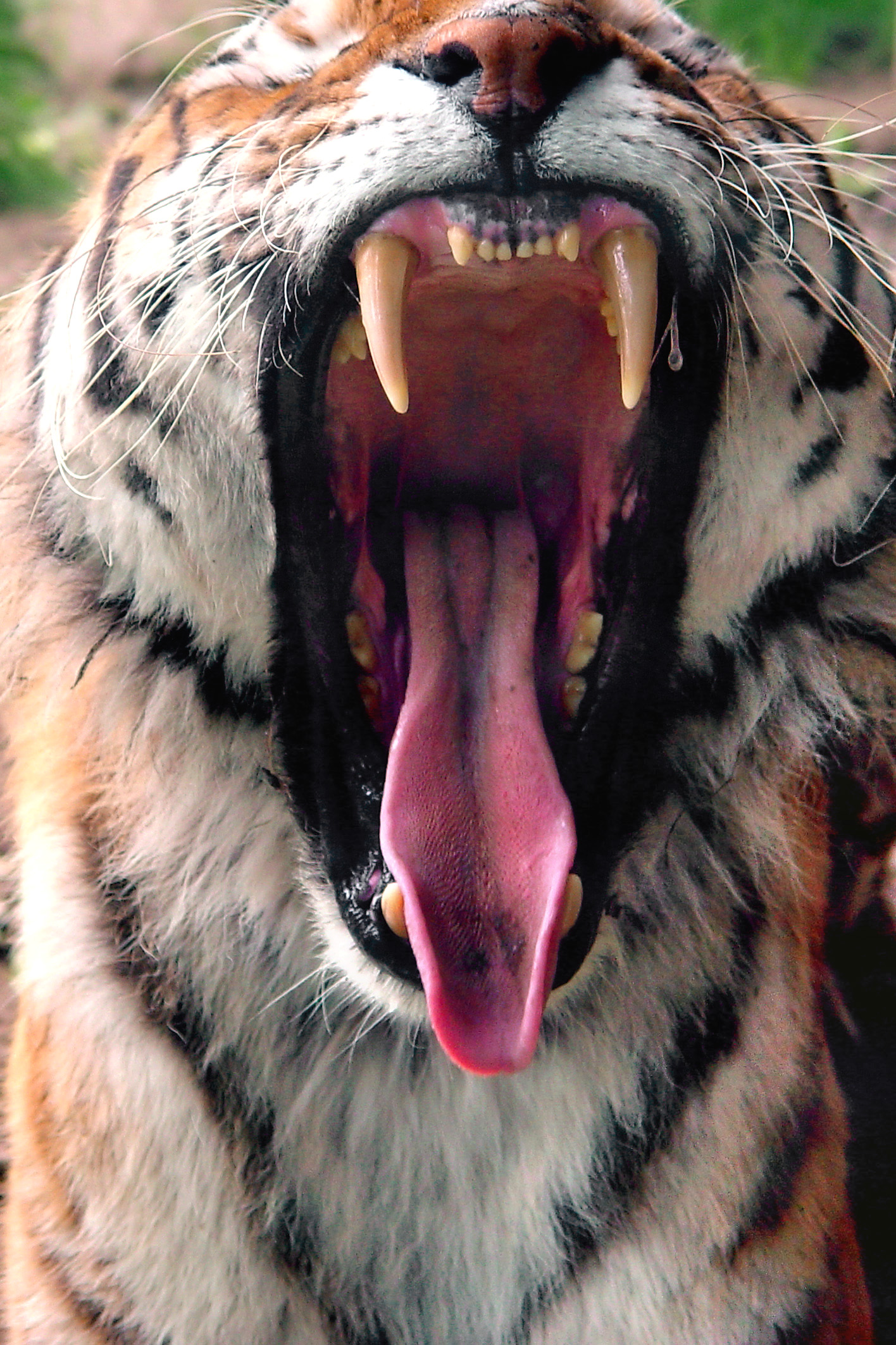 Gebiss eines sibirischen Tigers